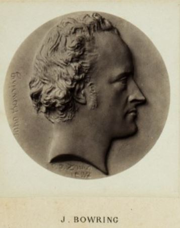 John Bowring (1792-1872) médaillon par David d'Angers in Les médaillons de David d'Angers (1788-1856) réunis et publiés par son fils David d'Angers, Robert (1833-1912). 1867 (BNF, Gallica)